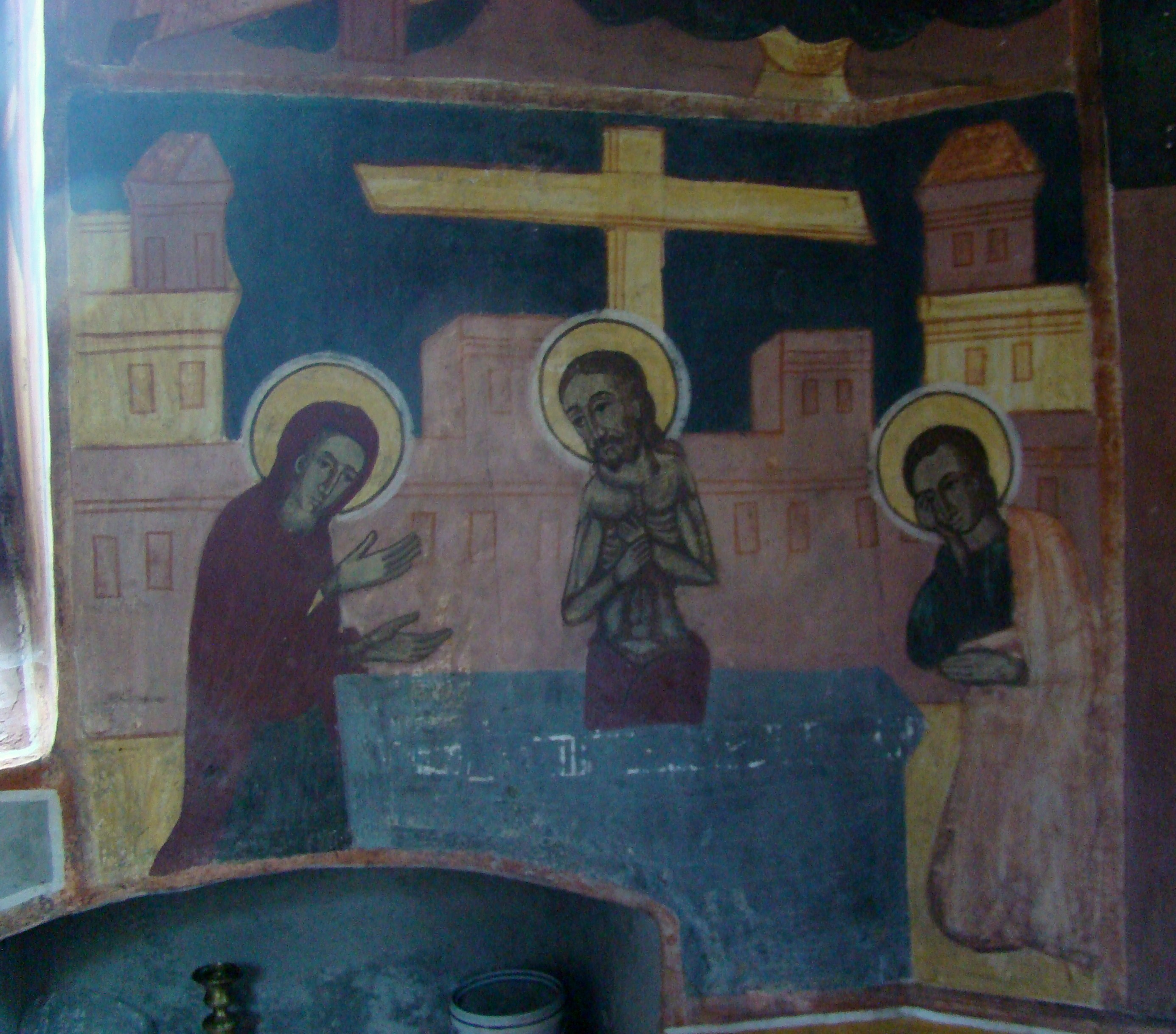 Biserica "Naşterea Domnului" , sat SĂRATA; comuna PORUMBACU DE JOS